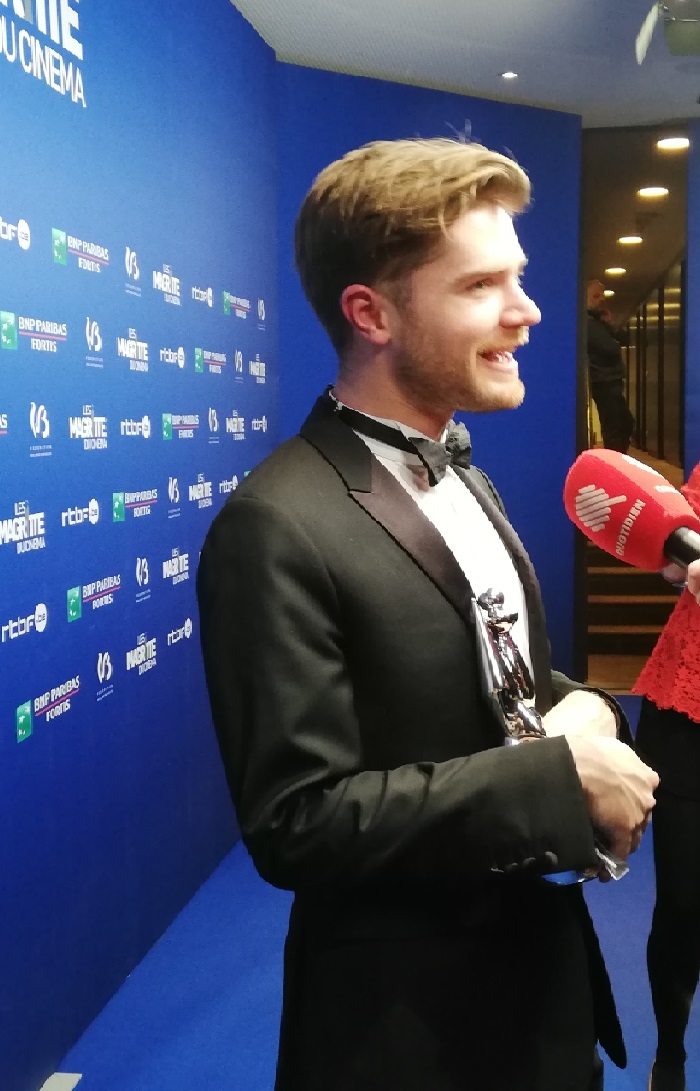 Photo Call Magritte 2019